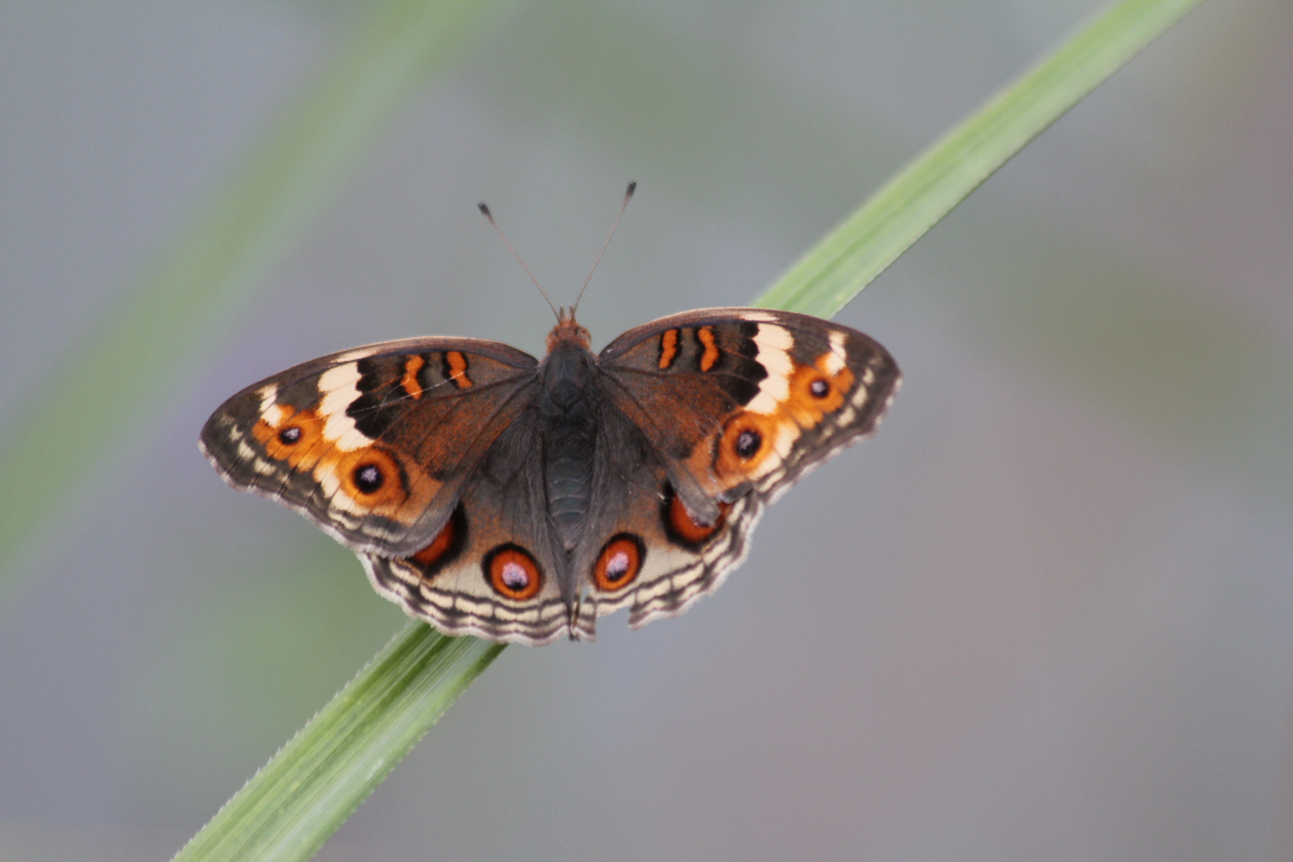 302孔雀青蛺蝶10(郭月秀攝)